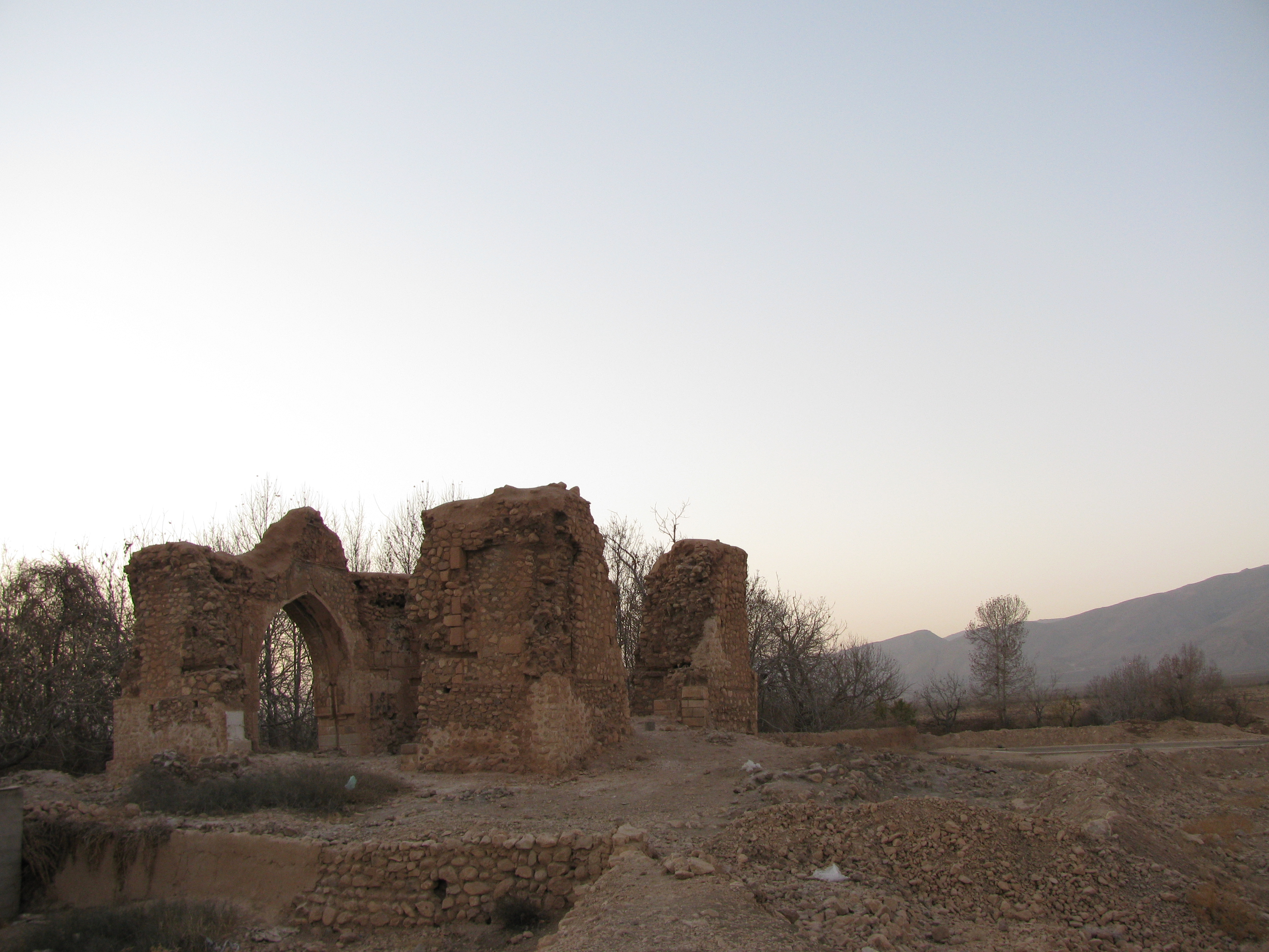 چهارطاقی رباط (پیر رباط)